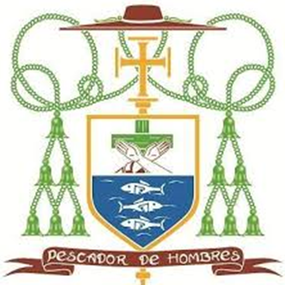 Escudo Obispo David Albin Zywiec Sidor.